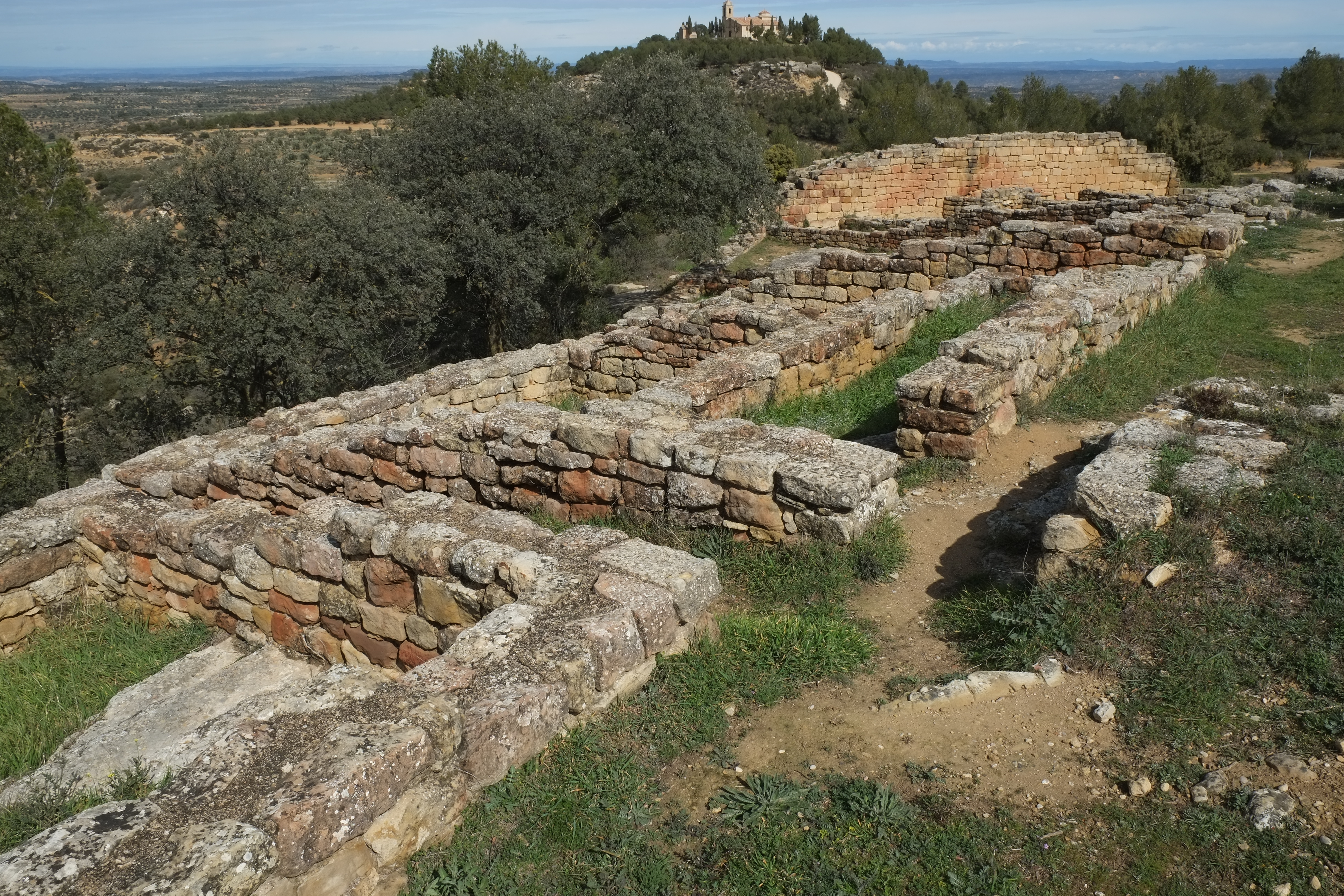 Iberische Siedlung San Antonio bei Calaceite in der Provinz Teruel (Aragonien/Spanien)